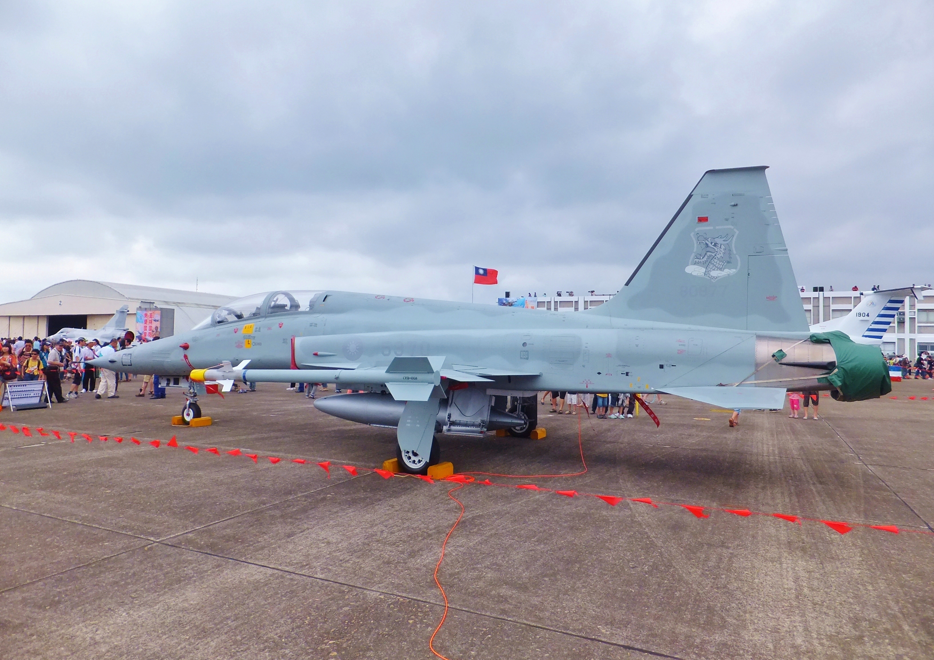 2012年空軍新竹基地營區開放活動，參展之737聯隊F-5F戰鬥機。